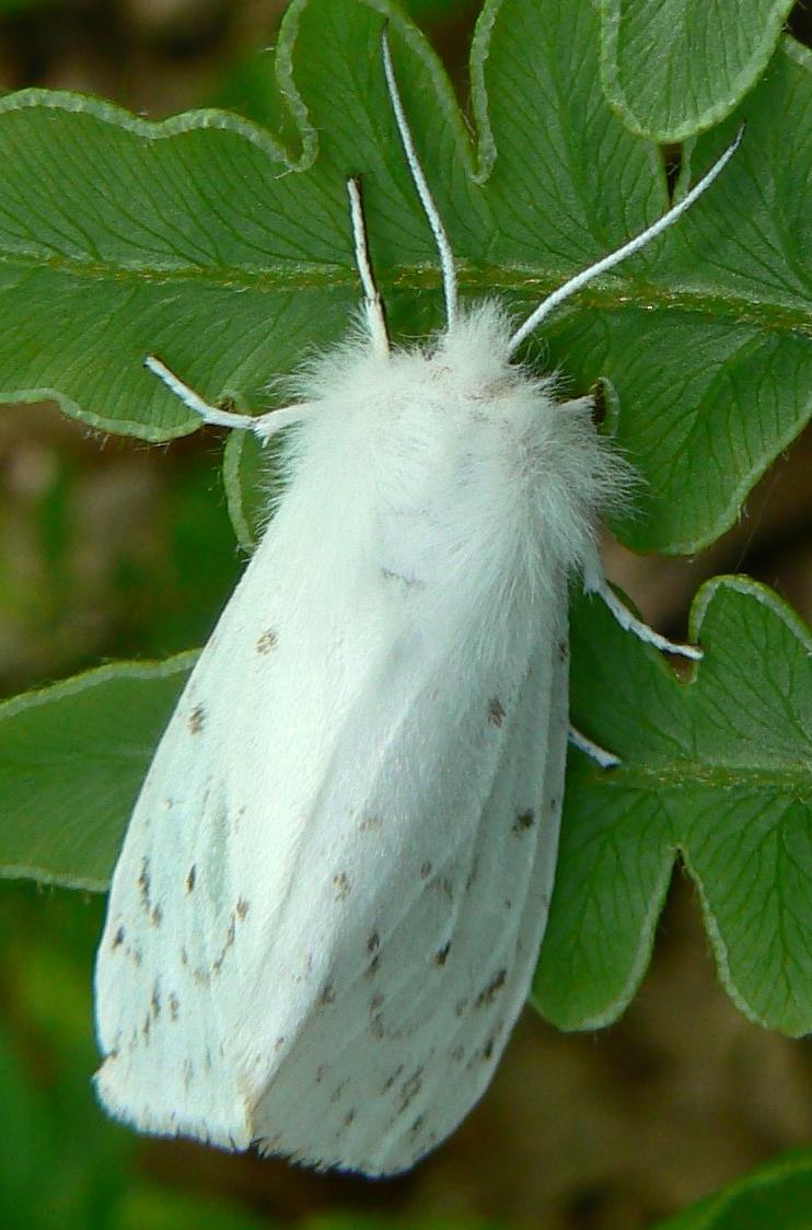 Estigmene acrea